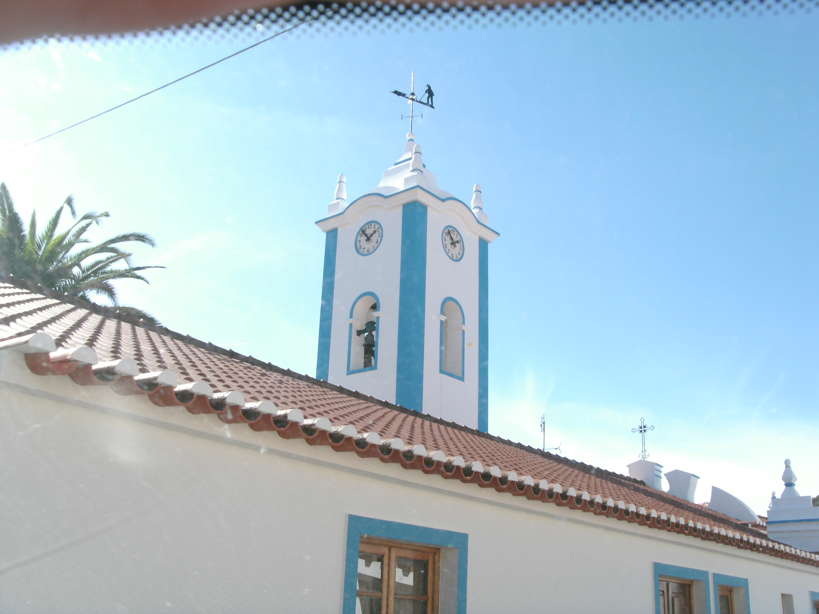 Kirche von Santa Clara